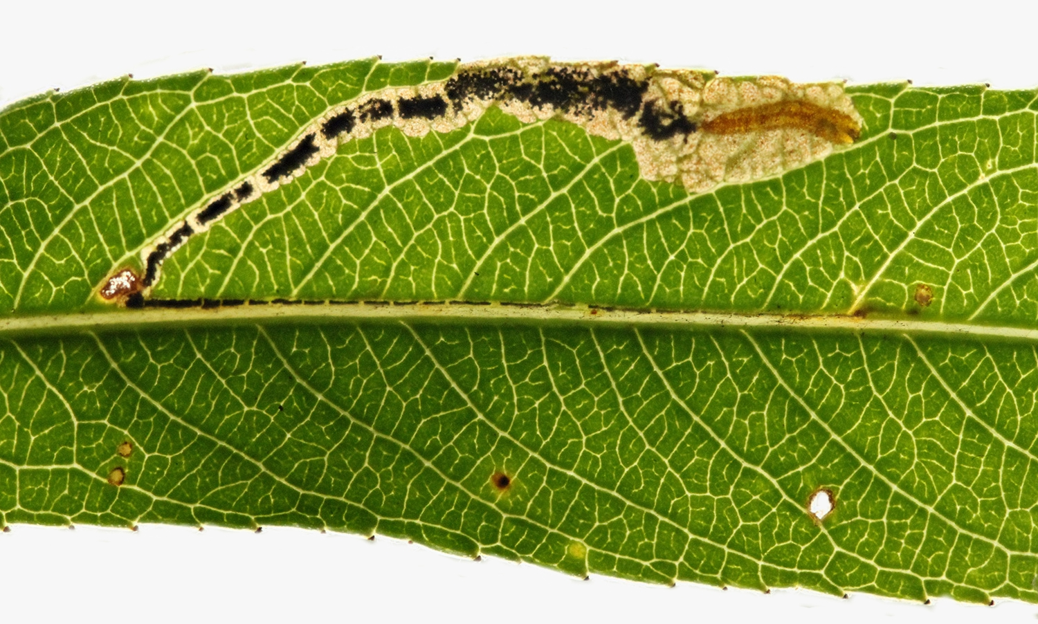 Stigmella obliquella mine, Deeside, North Wales, Oct 2013